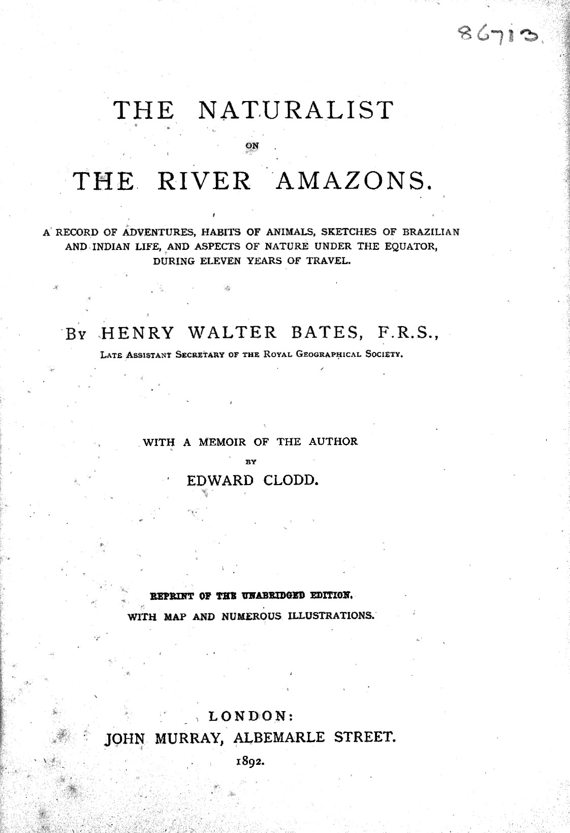 Wellcome Images